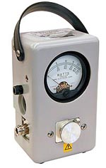 A Bird 43 inline RF power meter